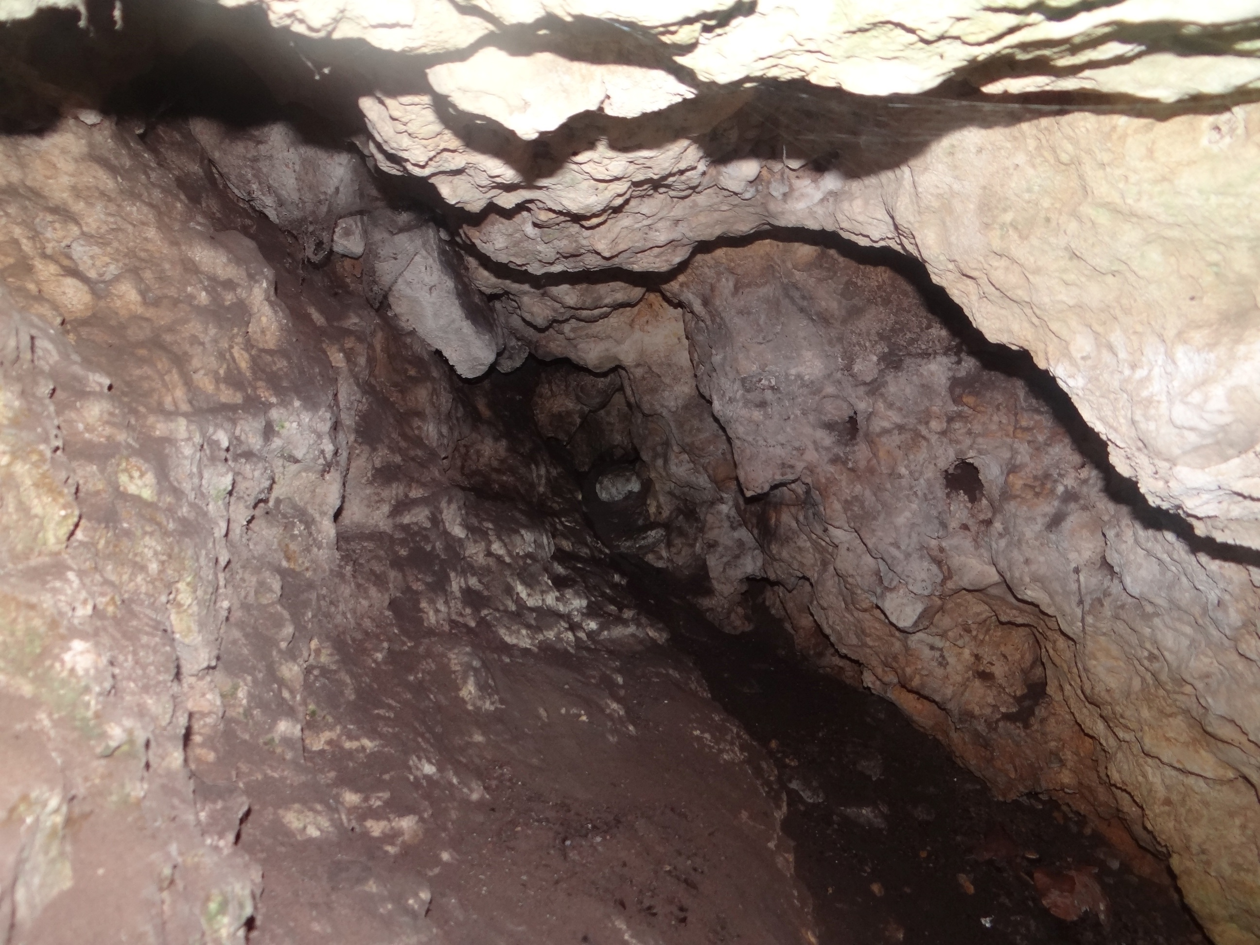 Jaskinia w Kruczej Skale. Lokalizacja: Polska, Wyżyna Częstochowska, Skały Kroczyckie, wzgórze Łysak, skała Wysokie Okapy